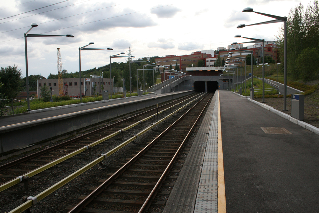 Rommen T-banestasjon i vestgående retning mot Romsås.